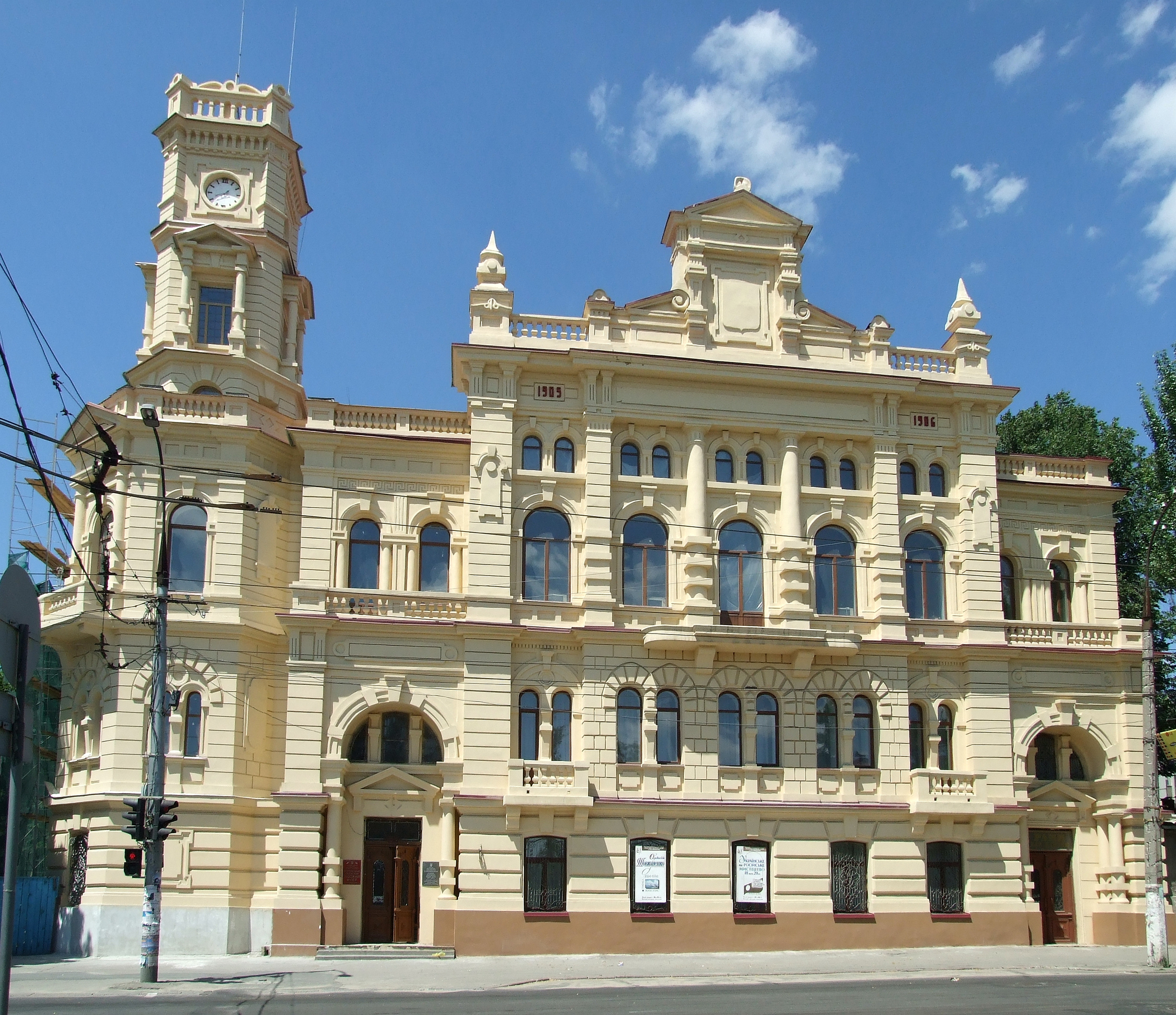 Будівля міської думи, 1905 р.